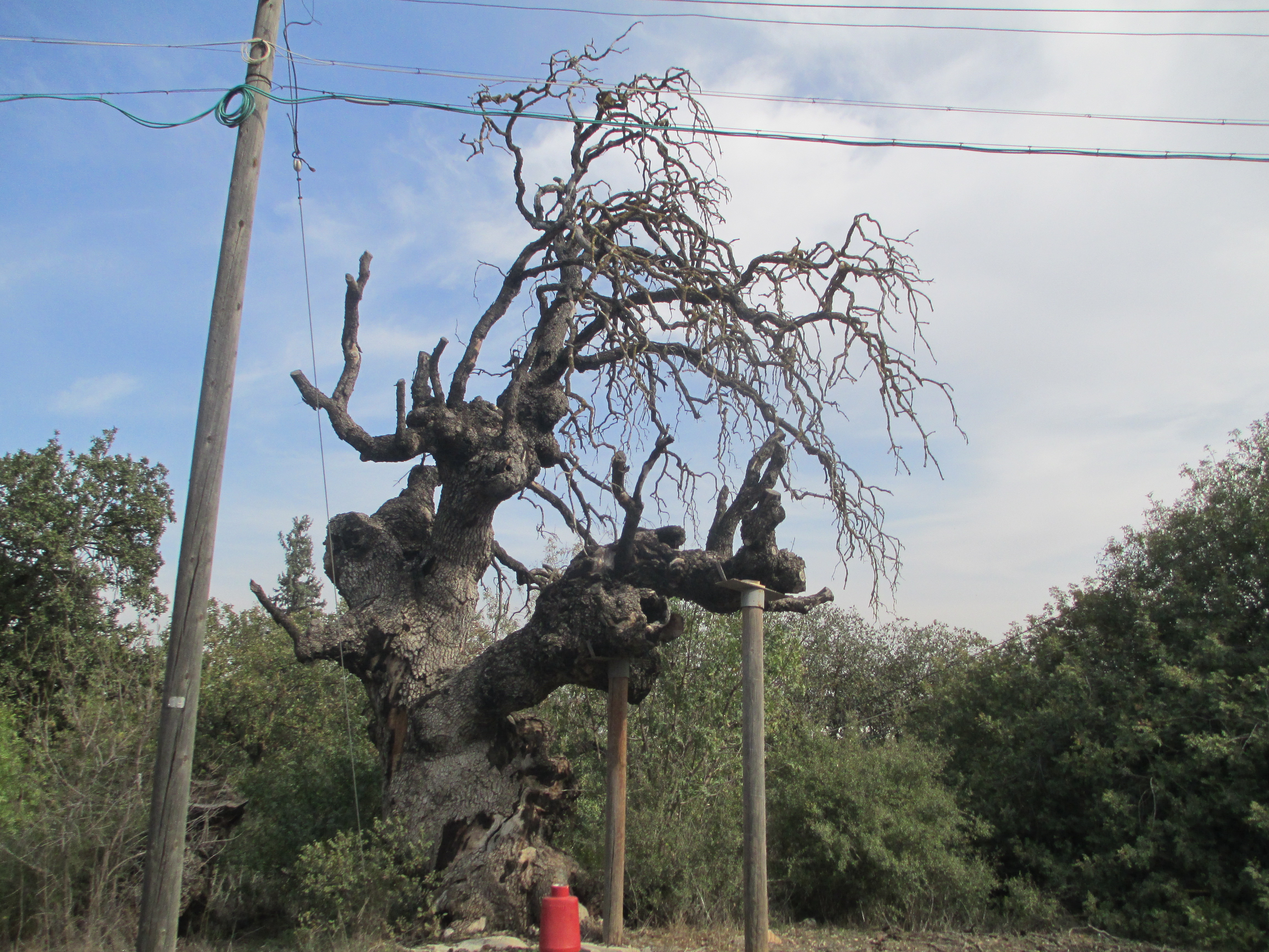 אלון תבור עתיק בבית ספר שדה אלון התבור